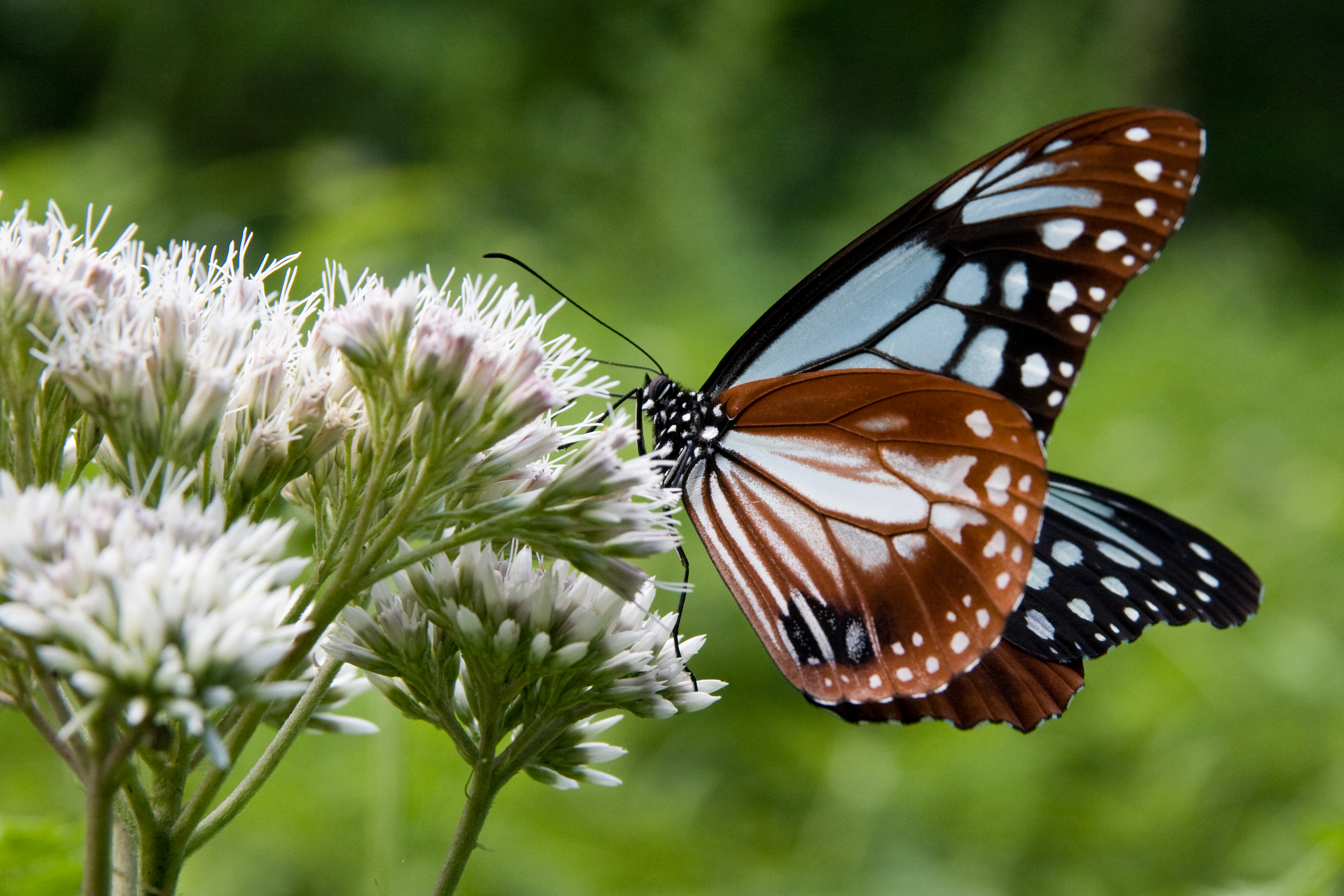 アサギマダラ (学名:Parantica sita)